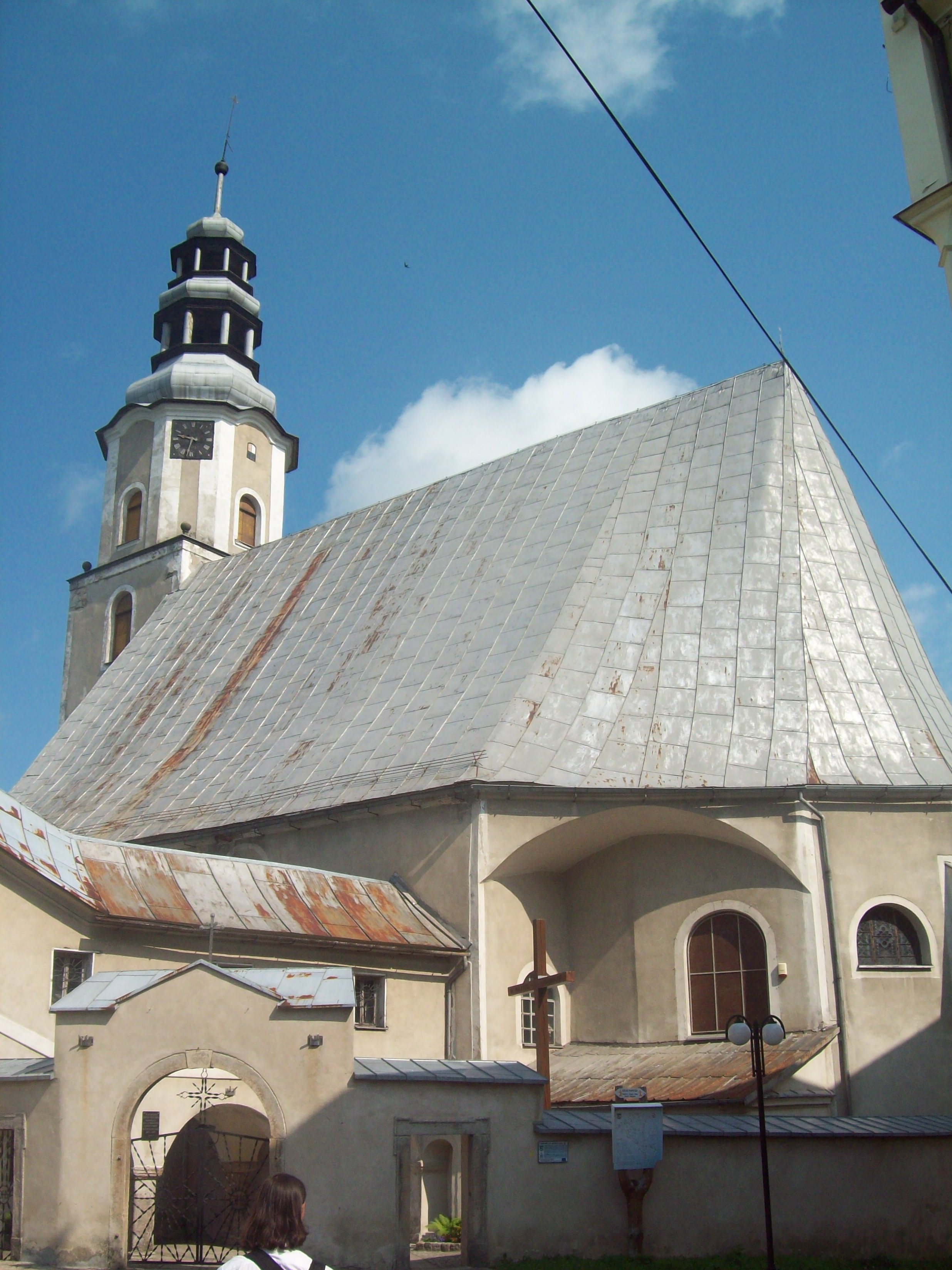 Międzylesie, kościół Bożego Ciała